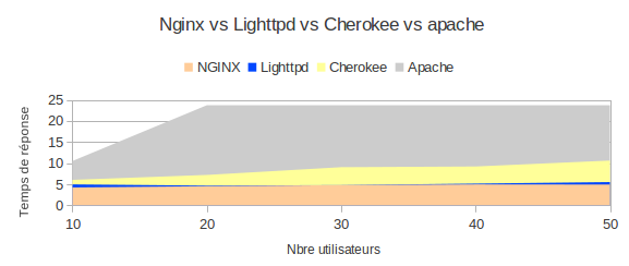 Diagramme resultat benchmark nginx vs lighttpd vs cherokee vs apache